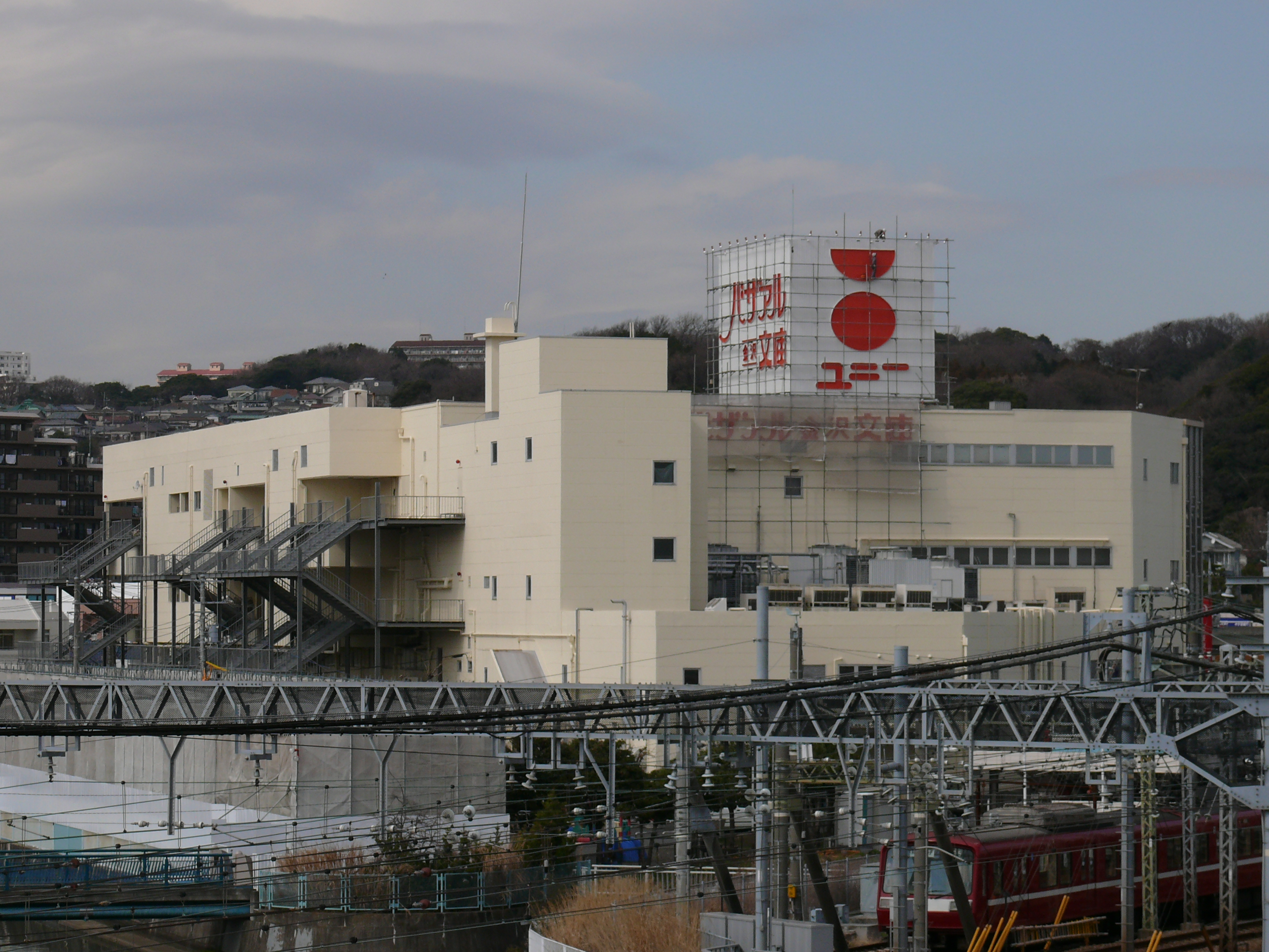 旧ユニー金沢文庫店